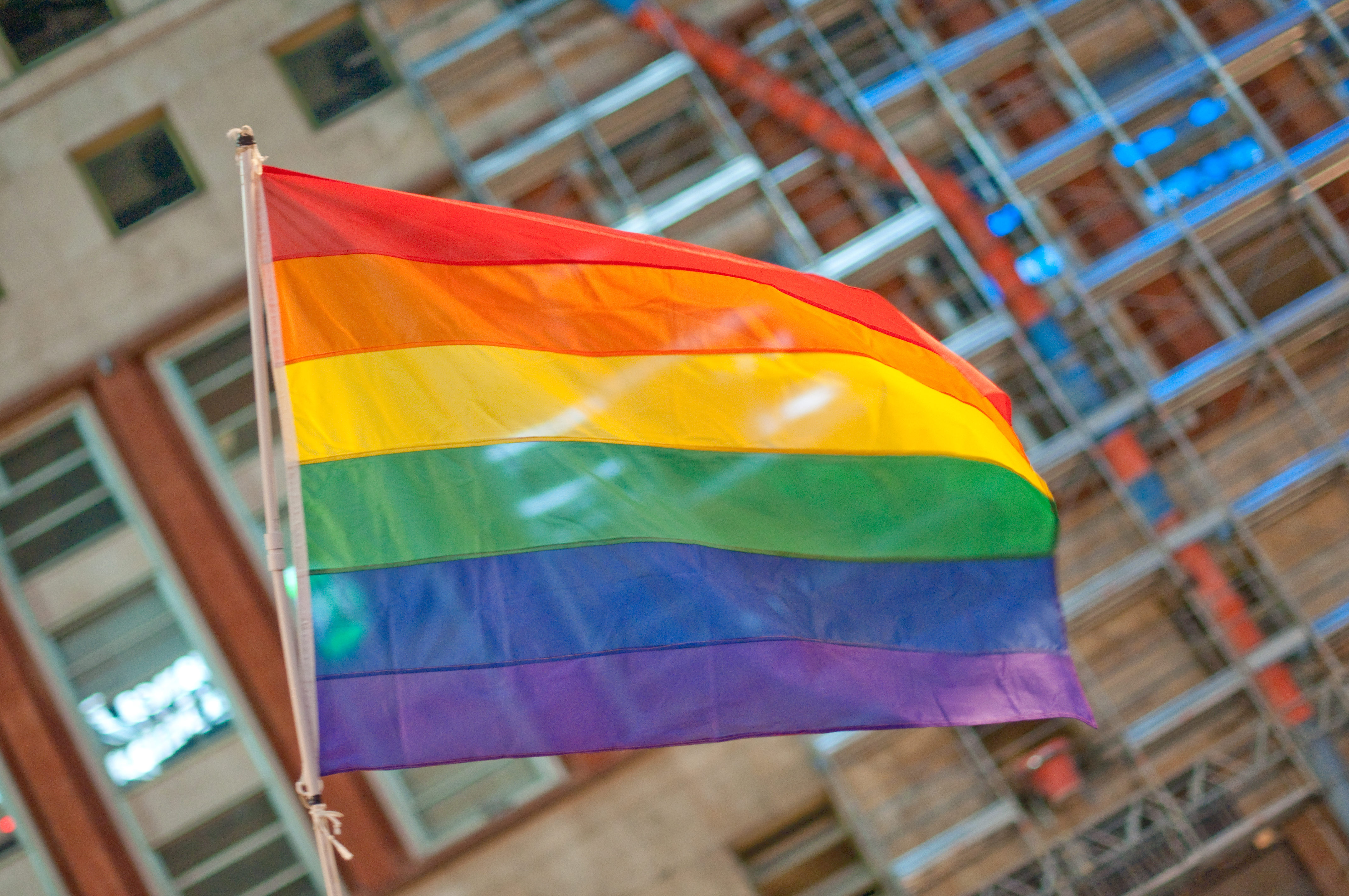 rainbow flag